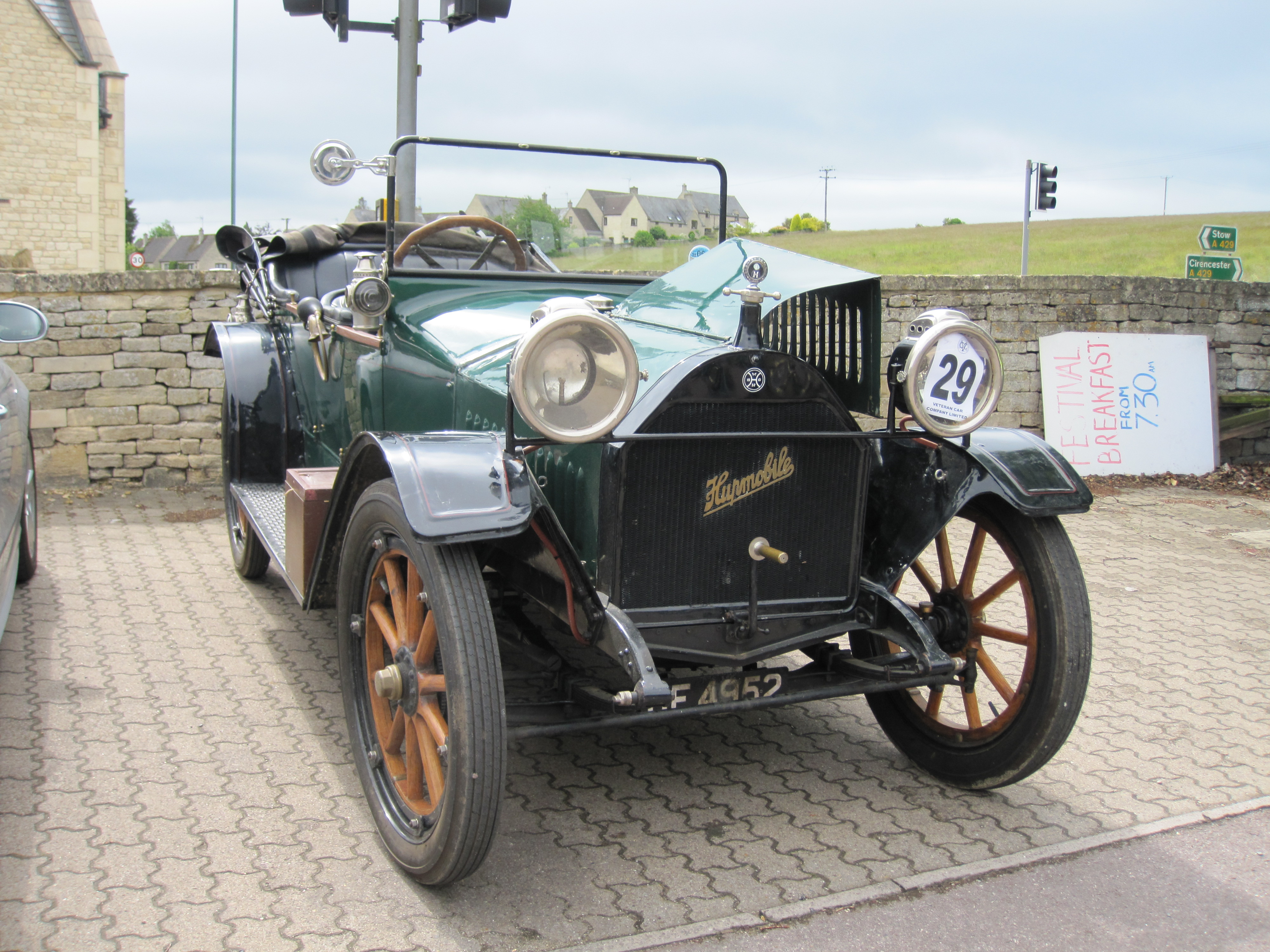 1913 Hupmobile Model 32 chassis 35943 Engine 34998 Reg BF 4952